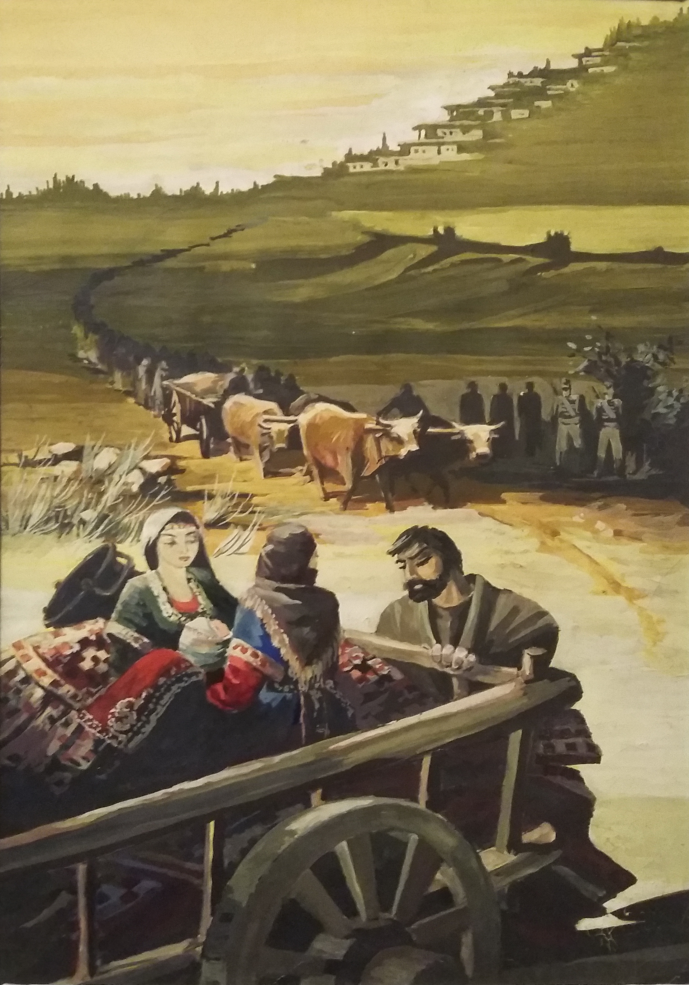 Նկարիչ: Վ. Հովհաննիսյան